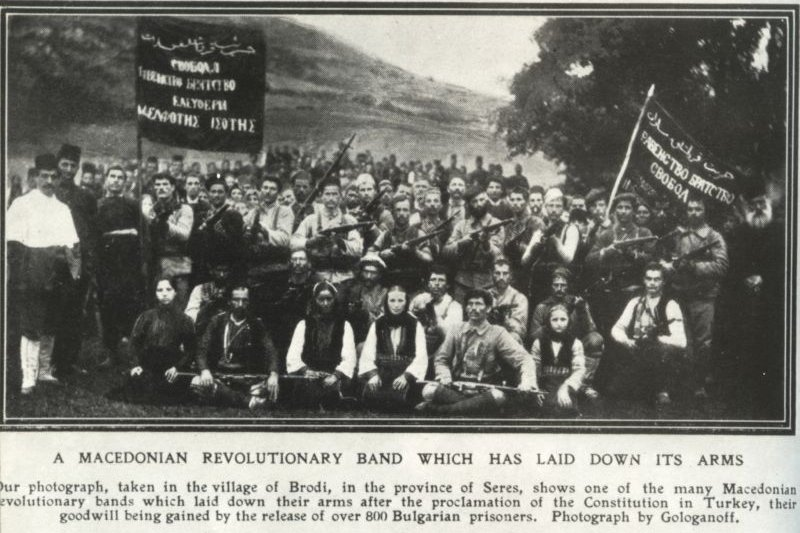 Горнобродската чета на ВМОРО след Хуриета.